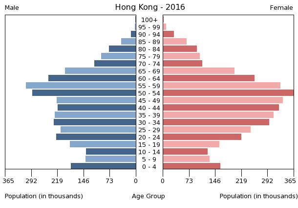 A population pyramid illustrates the age and sex structure of a country's population and may provide insights about political and social stability, as well as economic development. The population is distributed along the horizontal axis, with males shown on the left and females on the right. The male and female populations are broken down into 5-year age groups represented as horizontal bars along the vertical axis, with the youngest age groups at the bottom and the oldest at the top. The shape of the population pyramid gradually evolves over time based on fertility, mortality, and international migration trends.